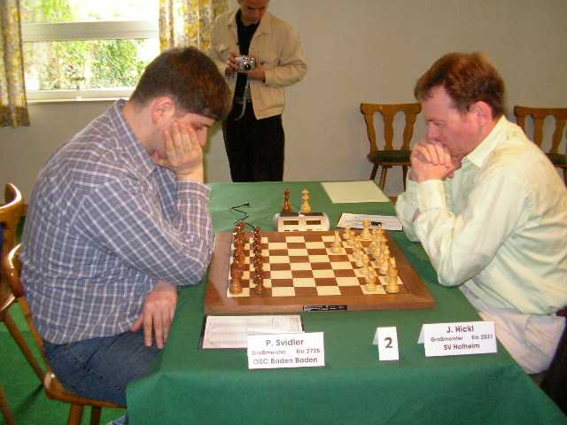 Peter Svidler (OSC Baden-Baden) und Jörg Hickl (SV Hofheim), Schachbundesliga am 9. April 2005 in Porz.